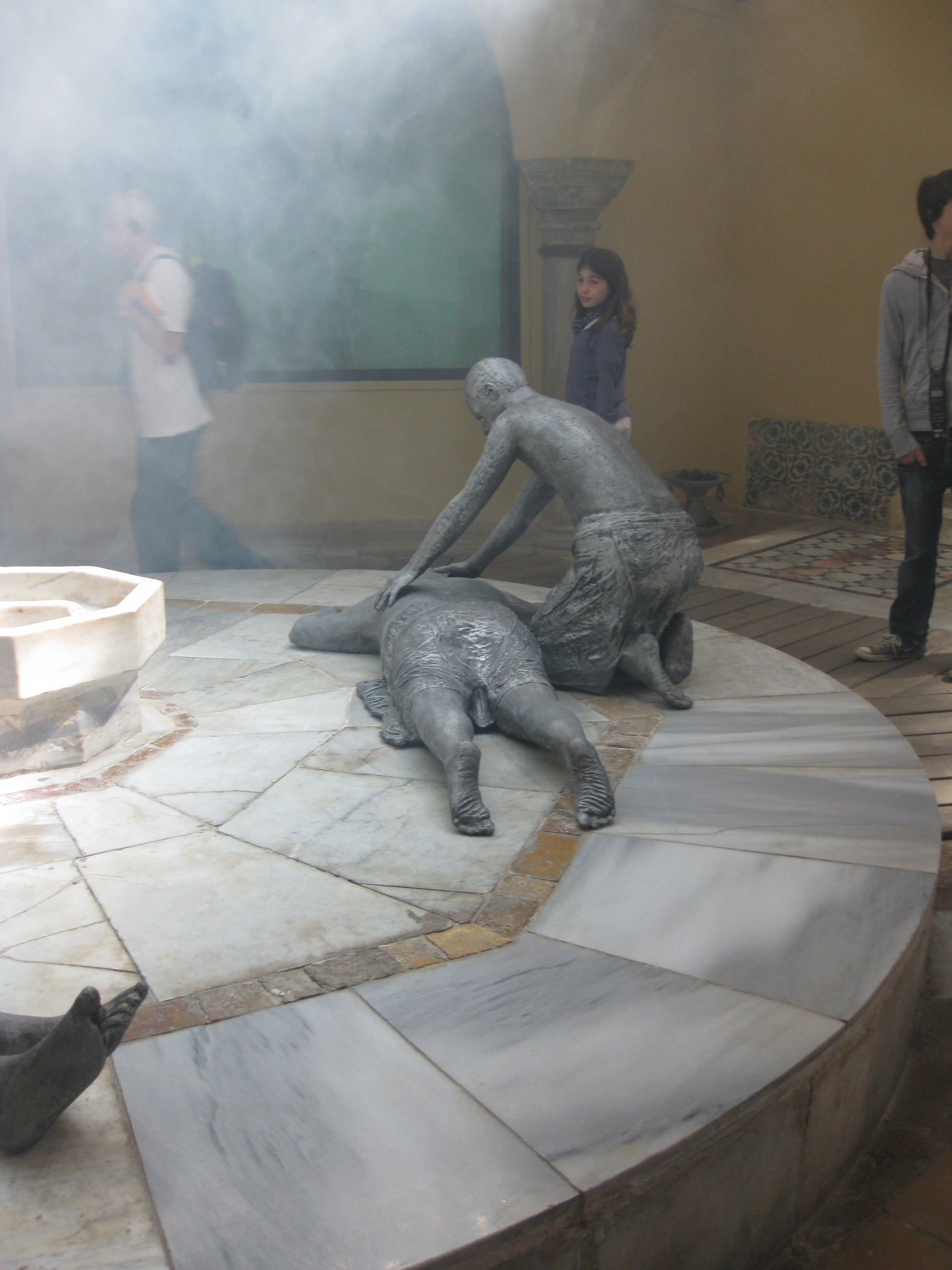 Acco (Acre, Akko) - Hamam el Basha (Hamam el Pasha) עכו חמאם אל באשה (חמאם אל פאשה) - בית המרחץ התורכי